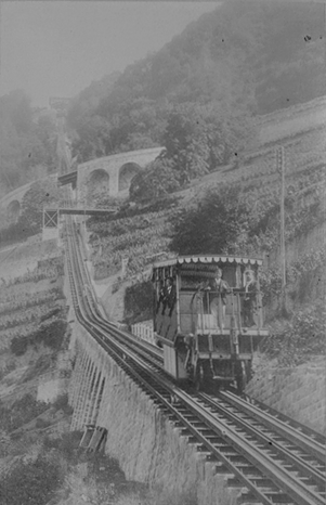 Seilbahn Territet–Montreux–Glion 1884